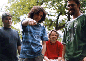 Ricardo Marrara, Marceleza, Prata e Quim, o Maskavo no início do ano 2000 lançando o CD Maskavo Já, antes da mudança de Brasília pra São Paulo.